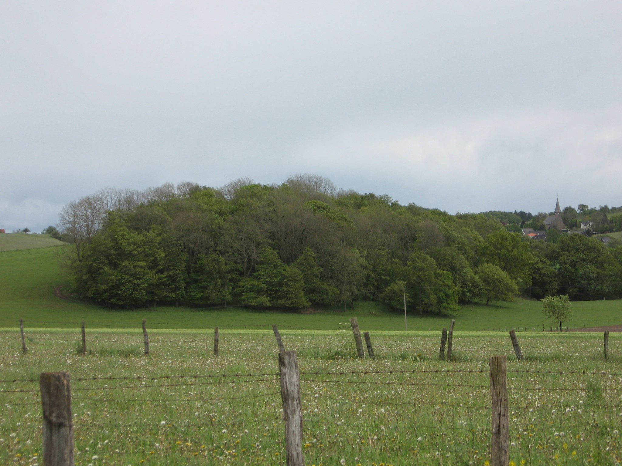 Das Naturschutzgebiet Hollenloch aus Richtung Westen aufgenommen. Rechts sind Dächer, darunter die Kirche, von Rösenbeck zu sehen.